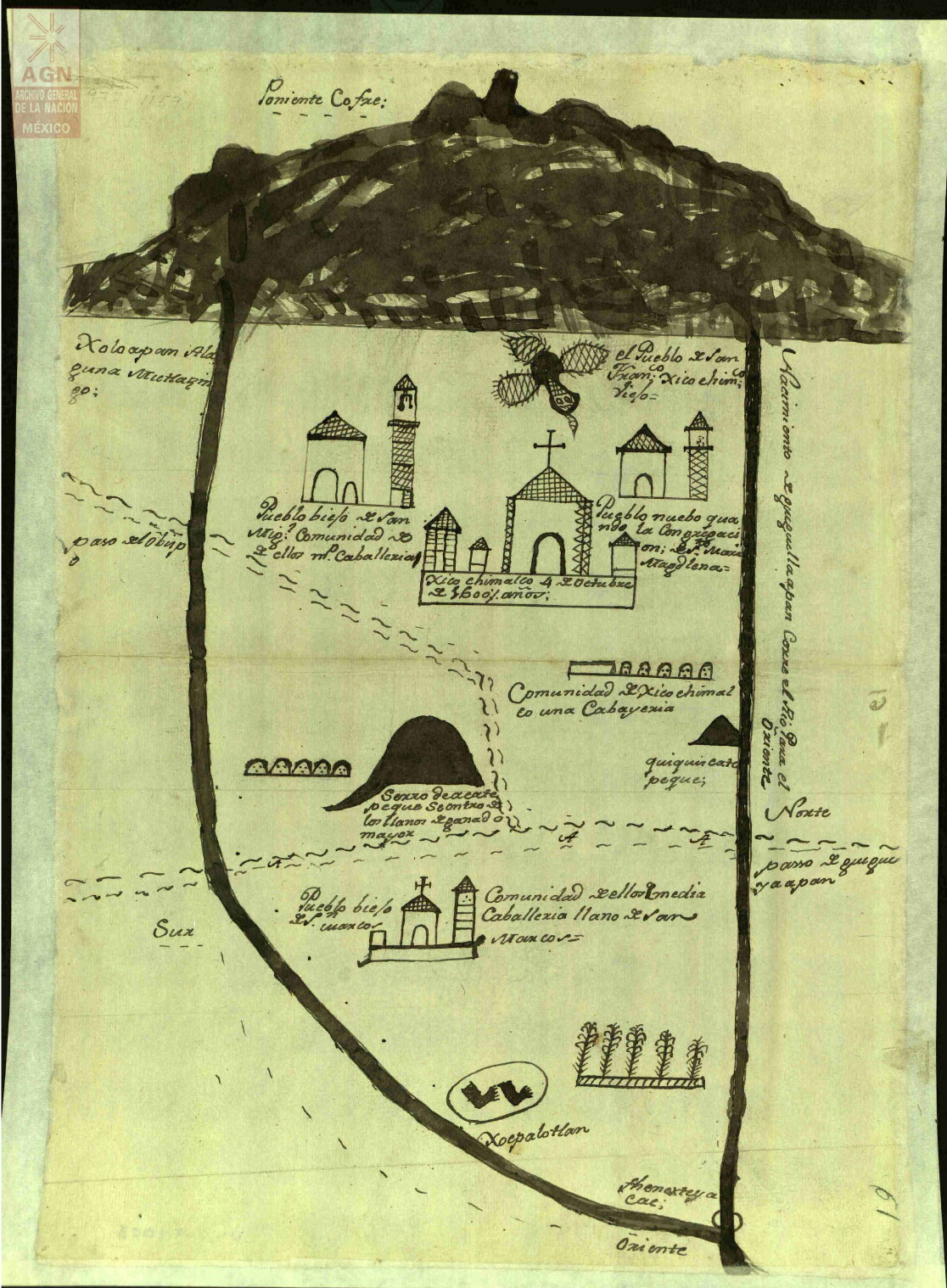 Lienzo de las tierras de Xicochimalco (hoy Xico) del siglo XVII, donde se aprecian las fundaciones que con el nombre de Xico existieron entre los siglos XVII y XVIII.